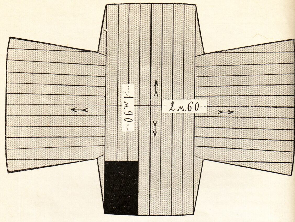 Chinese cross of grey squirrel legs / Sogenanntes Fellkreuz aus russischen oder chinesischen Fehpfotenstücken. Aus diesen Kreuzen ließ sich auf einfachste Weise (seitliches Schließen der Nähte) ein Mantel in der damals üblichen, chinesischen Form anfertigen. Bis in die erste Hälfte des 20. Jahrhunderts wurden die Kreuze auch als Halbfertigprodukte in alle Welt exportiert. Dann passten sich die chinesischen Kürschner dem westliche Markt an und lieferten die dort üblichen, rechtwinkligen Tafeln in Mantellänge.